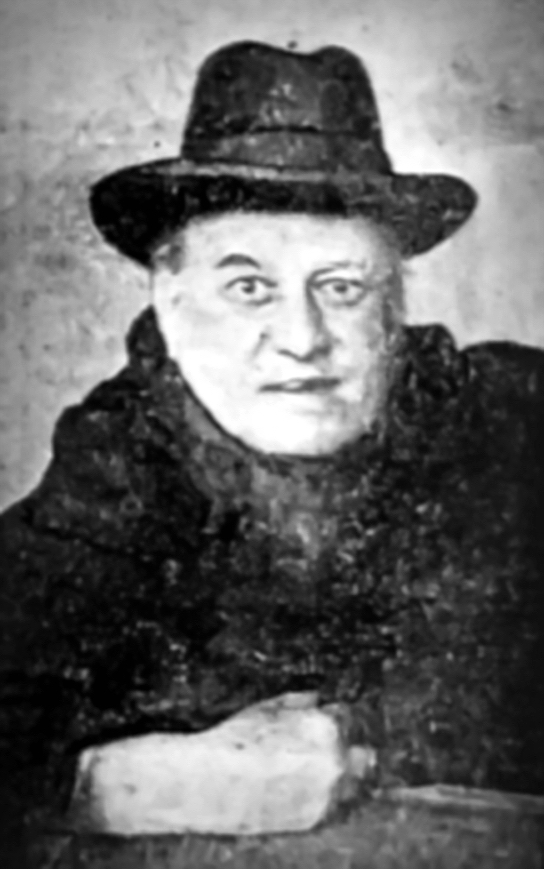 "Sir Aleister Crowley, le baronet anglais qui va être "refoulé" hors de France comme suspect. Il aurait fait de l'espionnage pendant la guerre et pratiquerait depuis la magie" (L'Ouest-Éclair, 19 avril 1929)